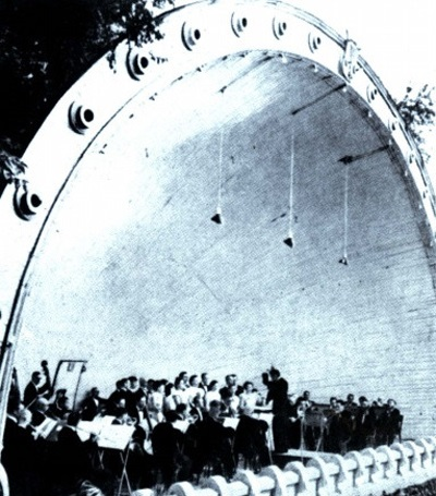 中文（香港）: 哈尔滨铁路文化宫